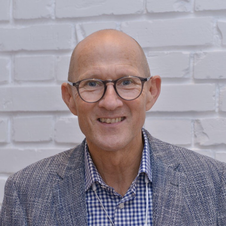 Christop Kohl (Architekt)